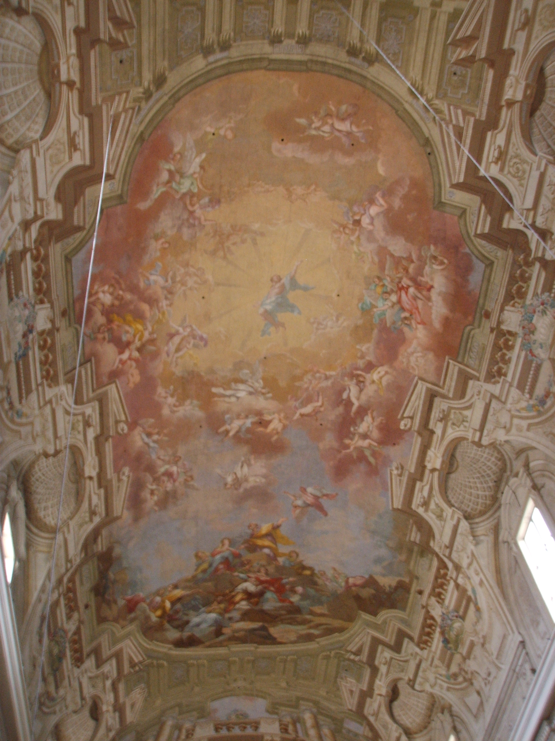 Santa Maria del Carmine, inside, Florence, Italy